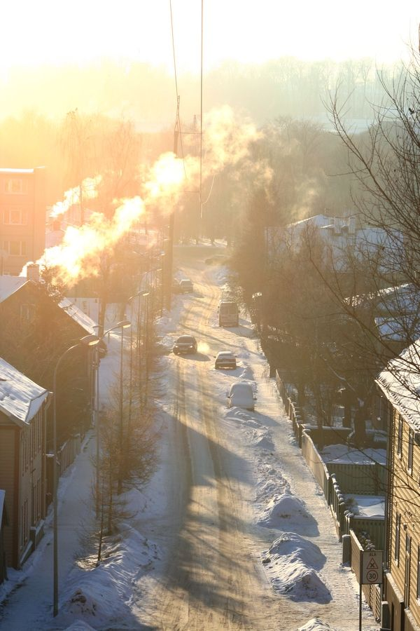 Mäe tänav.